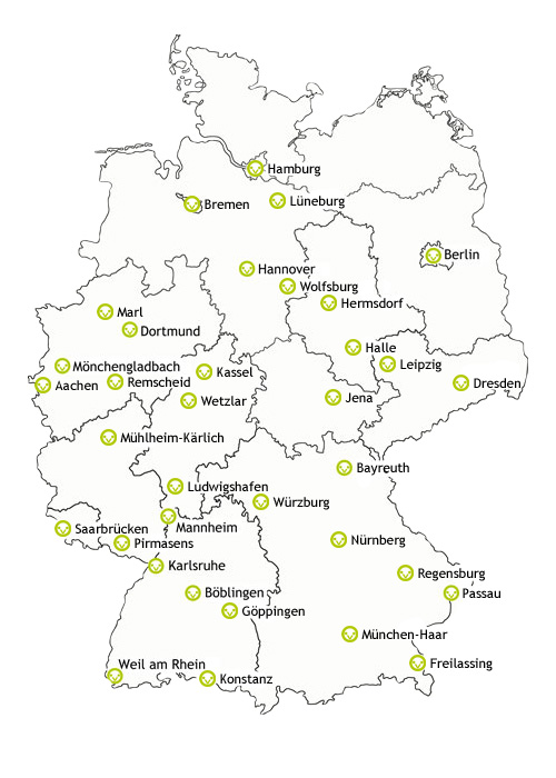 Standorte_Vertbaudet_Shop_Corner